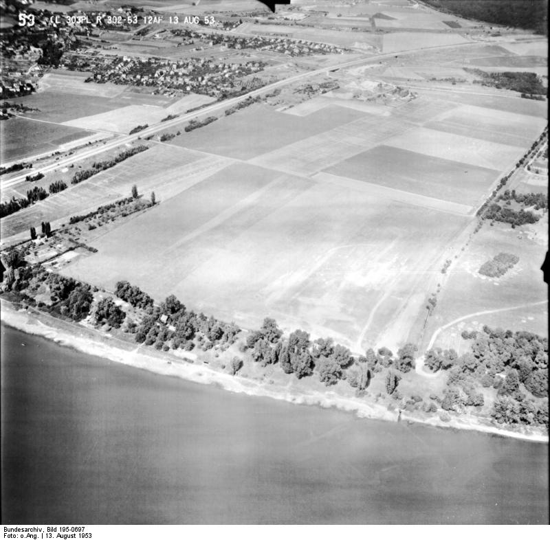 Rheinbefliegung der Alliierten 1953 Information added by Wikimedia users.